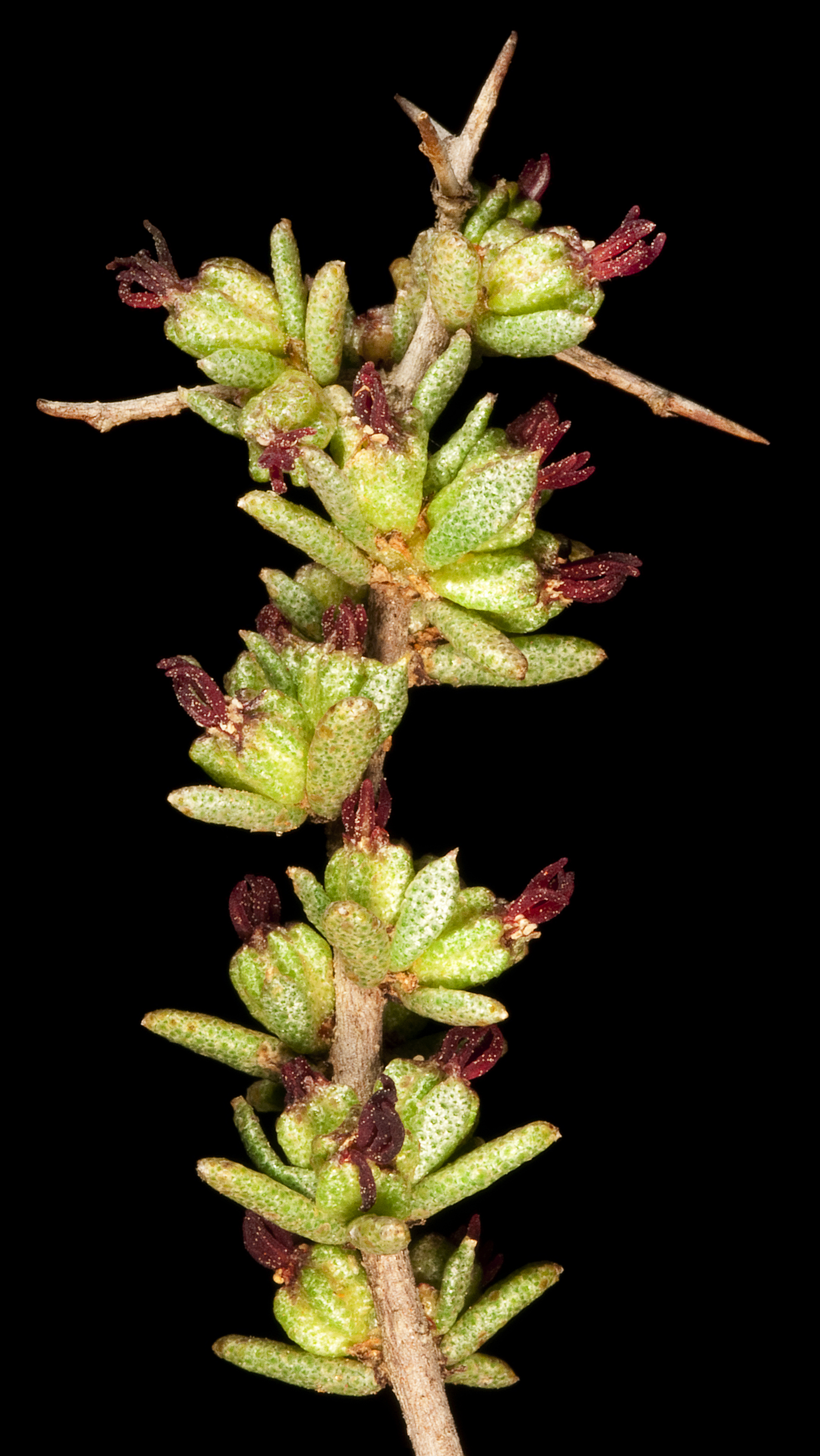 KRT4630